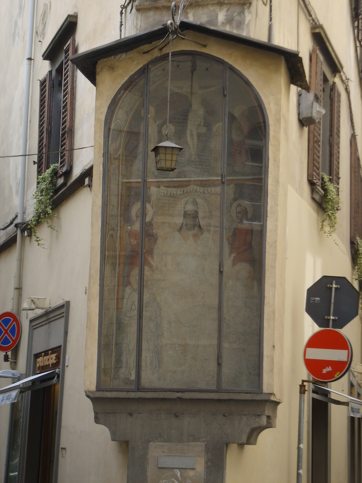 Tabernacolo in Via del Sole, in Florence Italy